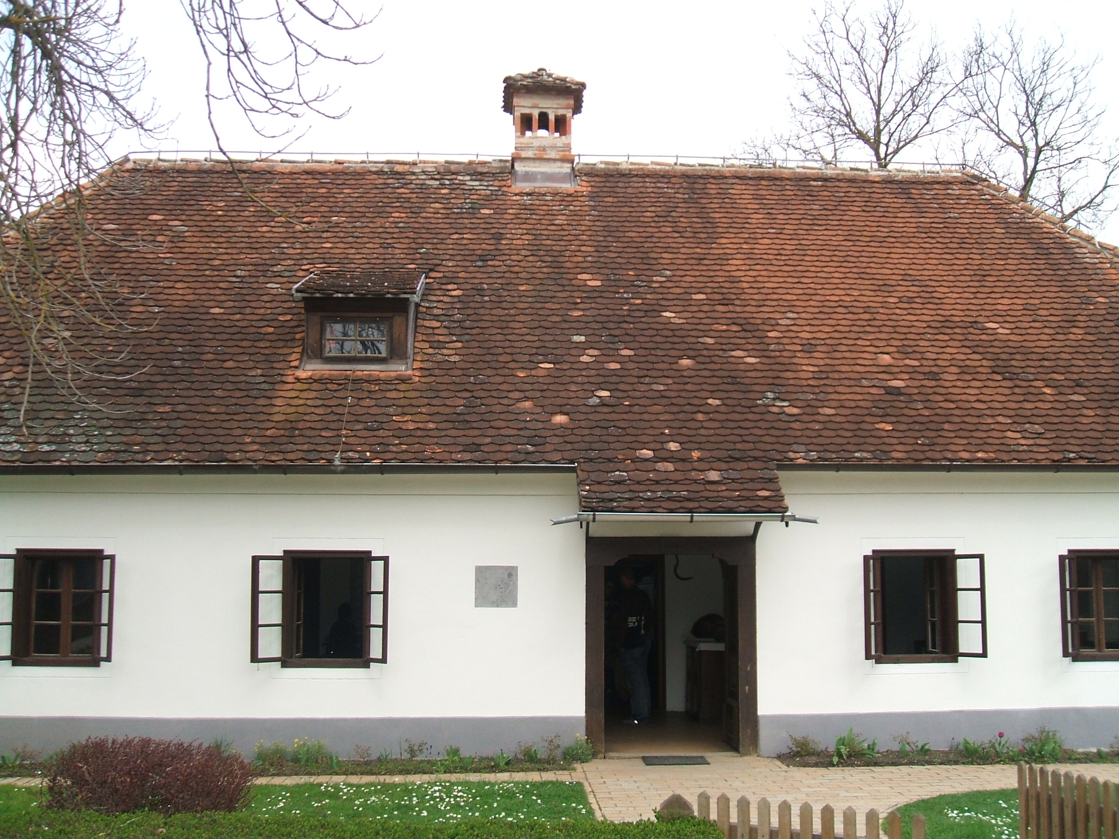 Titova rodna kuća a Kumrovcu.